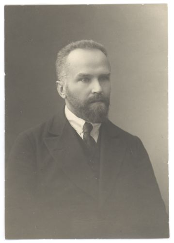 Русский и литовский философ Владимир Шилкарский